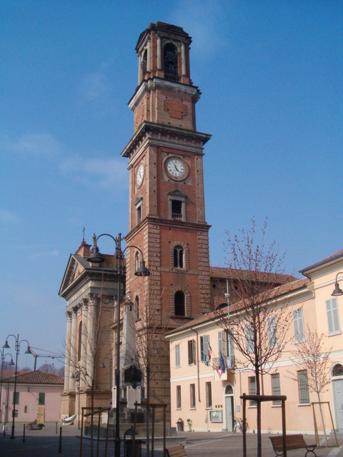 Brisckerly - Opera sua - Offanengo